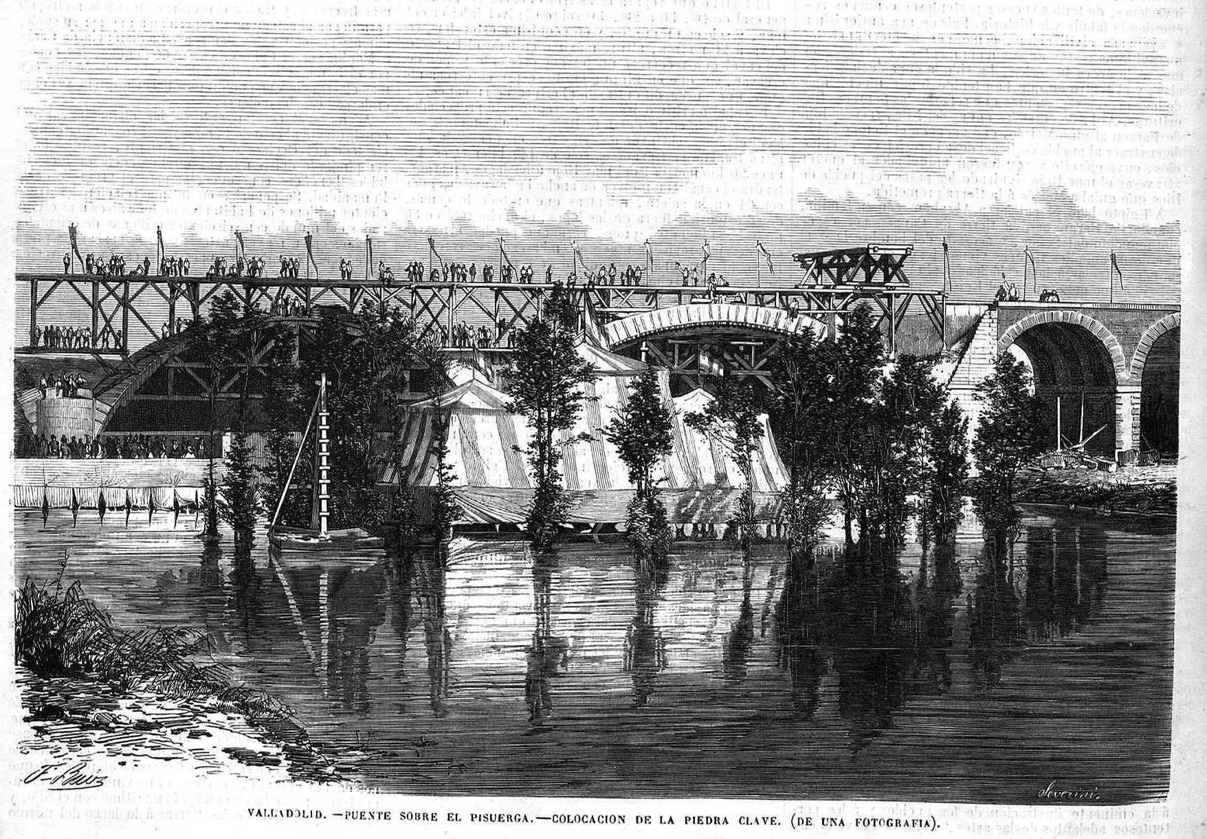 Valladolid, puente sobre el Pisuerga, colocación de la piedra clave, en la revista española El Museo Universal.